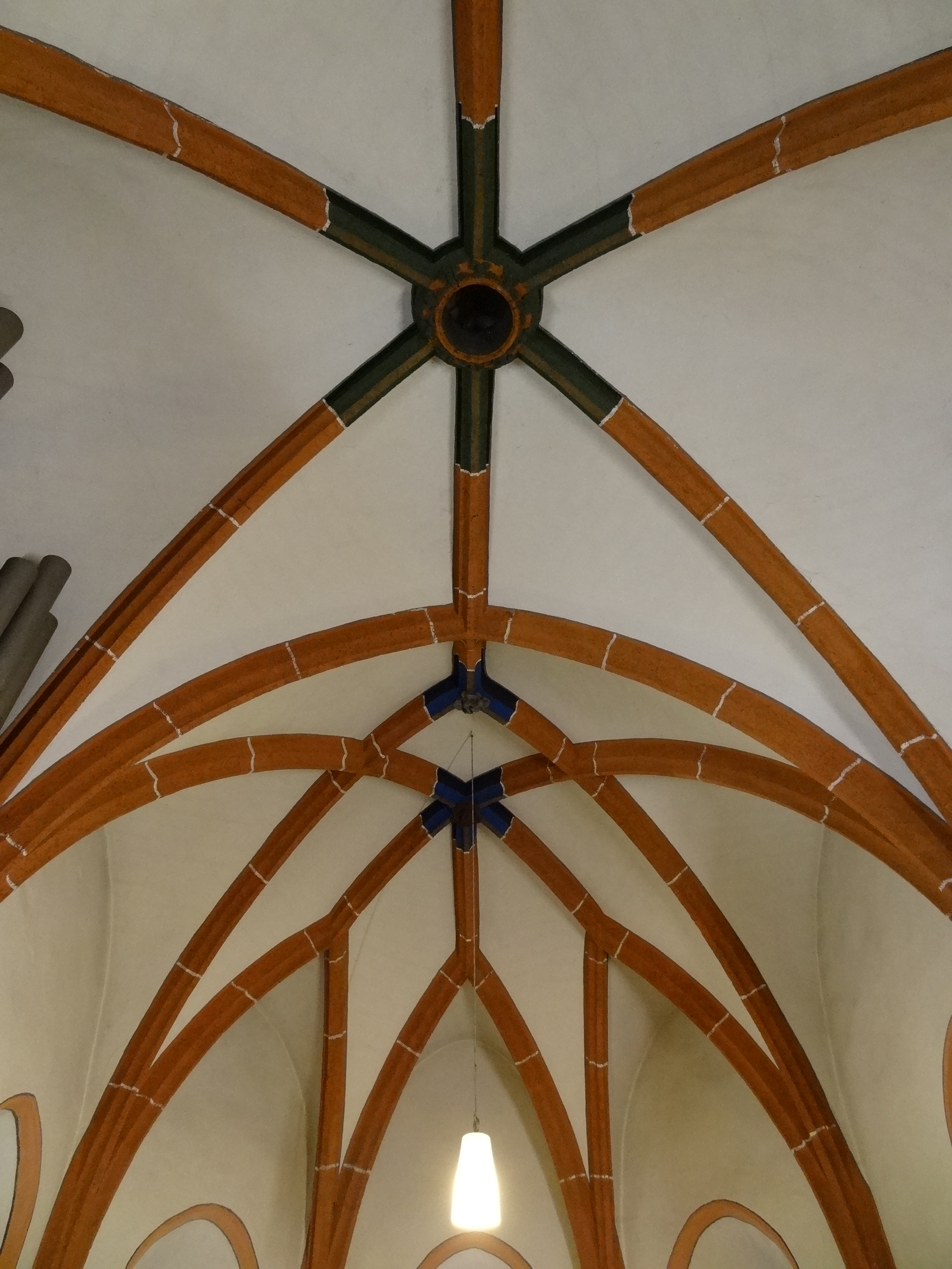 Evangelische Pfarrkirche (Schwickartshausen)